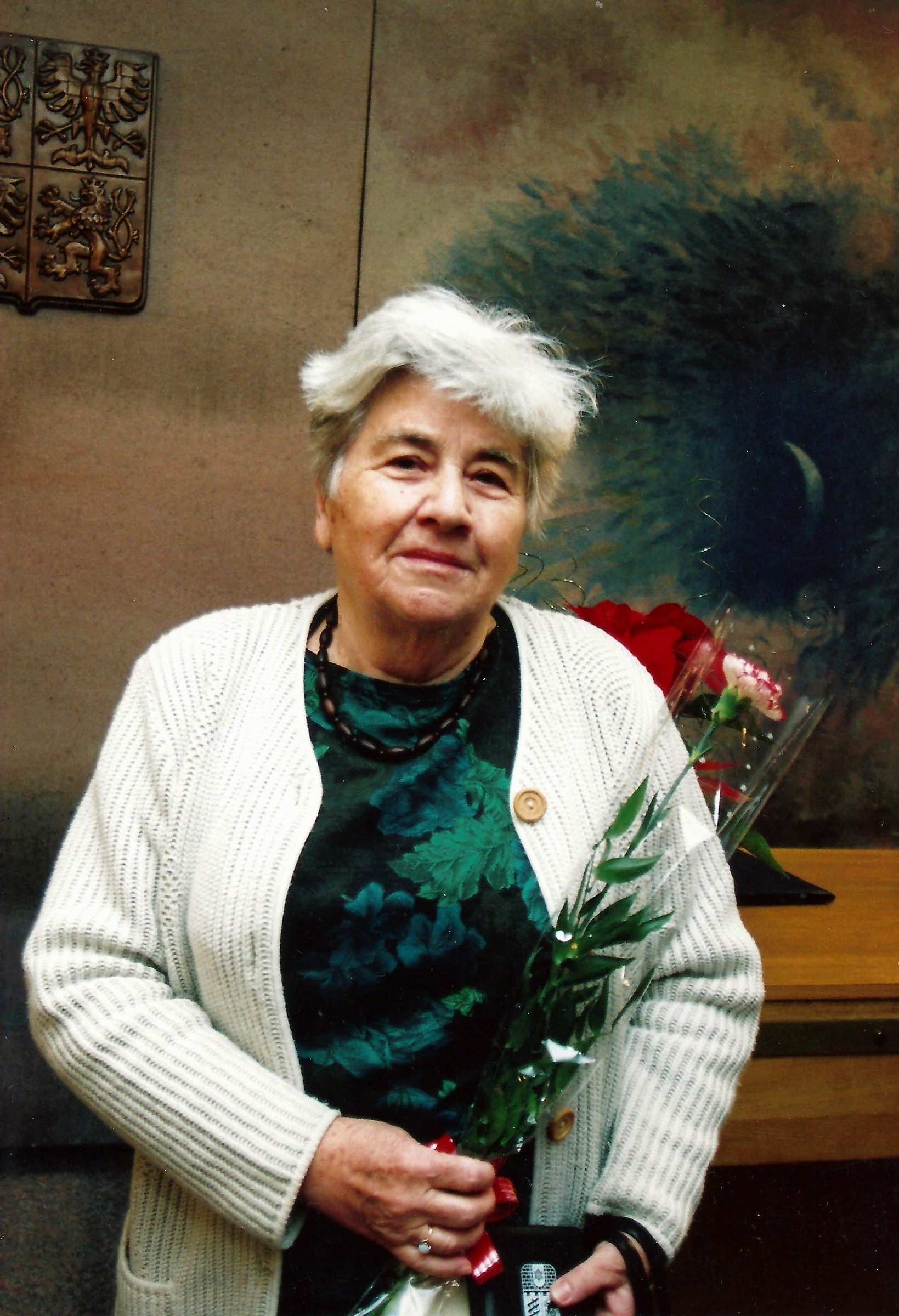 Zdenka Heřmanová, česká sinoložka a překladatelka (2005).